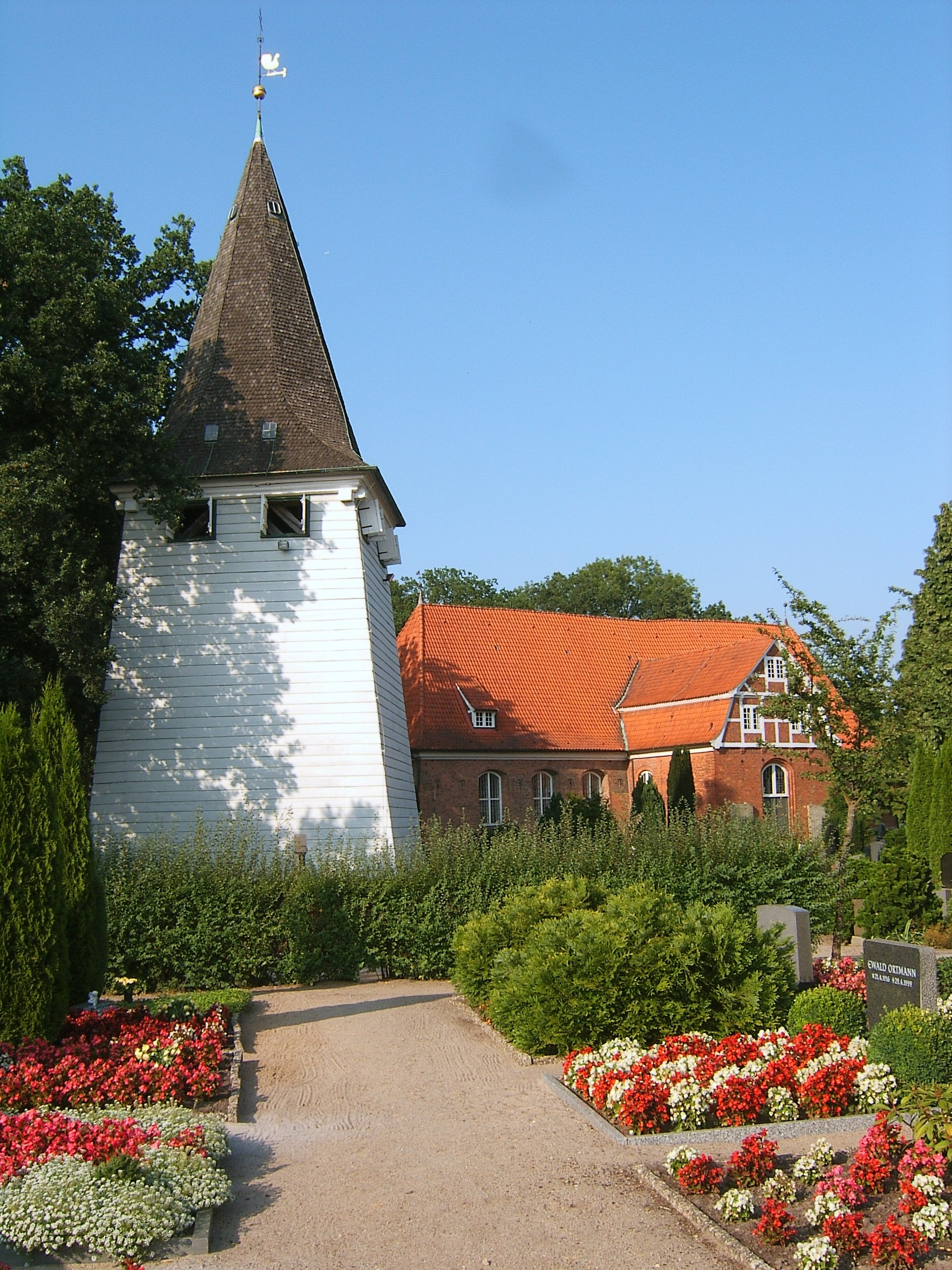 Hamburg, Kirchwerder, Kirche St. Severini This is a photograph of an architectural monument.